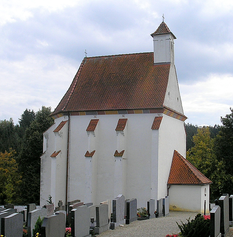 Friedhofskapelle zu den Vierzehn Nothelfern (Welden, Landkreis Augsburg, Bayerisch-Schwaben). Gesamtansicht von Norden. Eigene Aufnahme, Sept. 2007 / Cemetery chapel "Fourteen Holy Helpers" at Welden near Augsburg (Bavaria, Germany) Total view from the north. Own photo, Sept. 2007